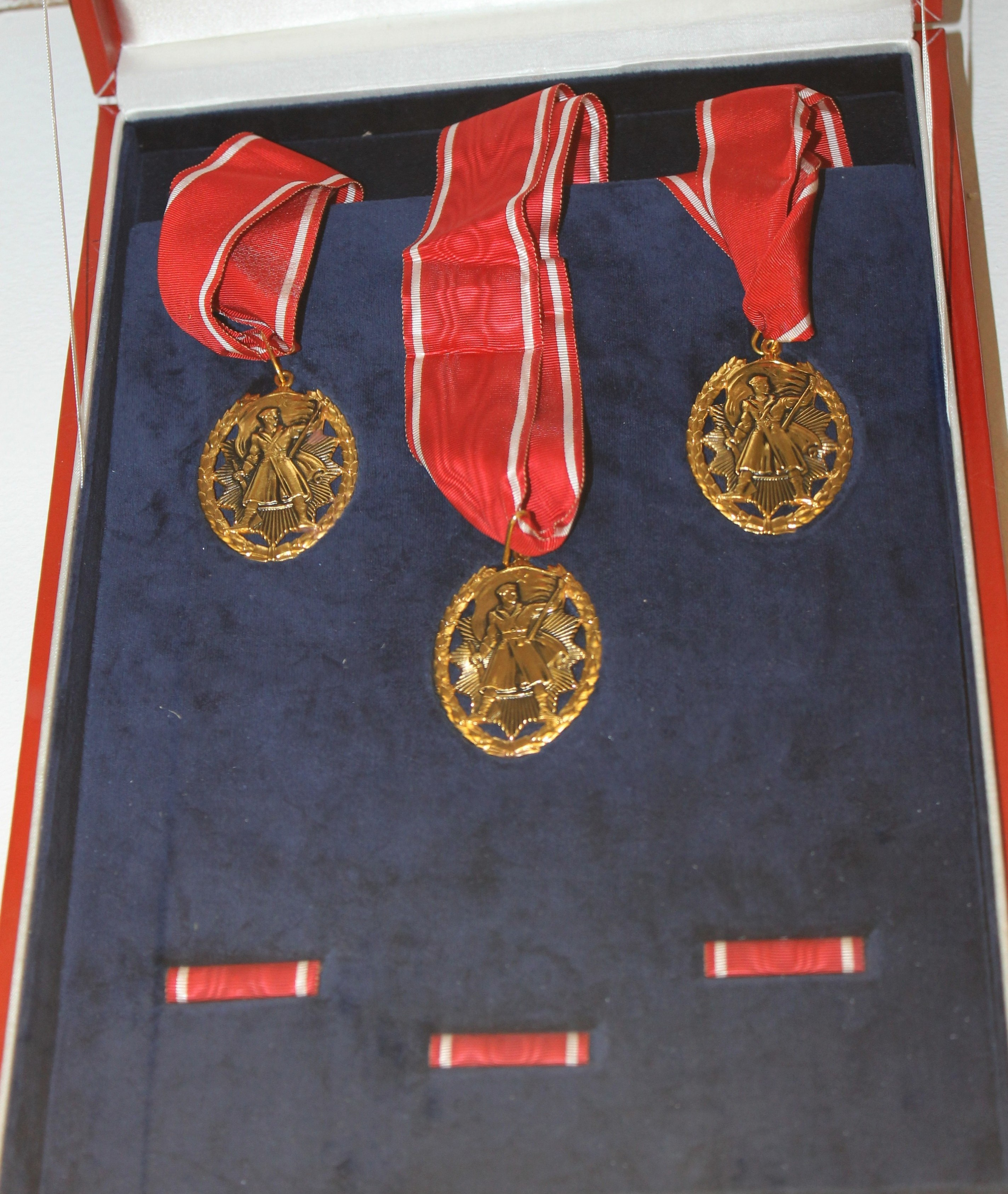 Три Титова Ордена народног хероја изложена у Музеју Југославије у Београду